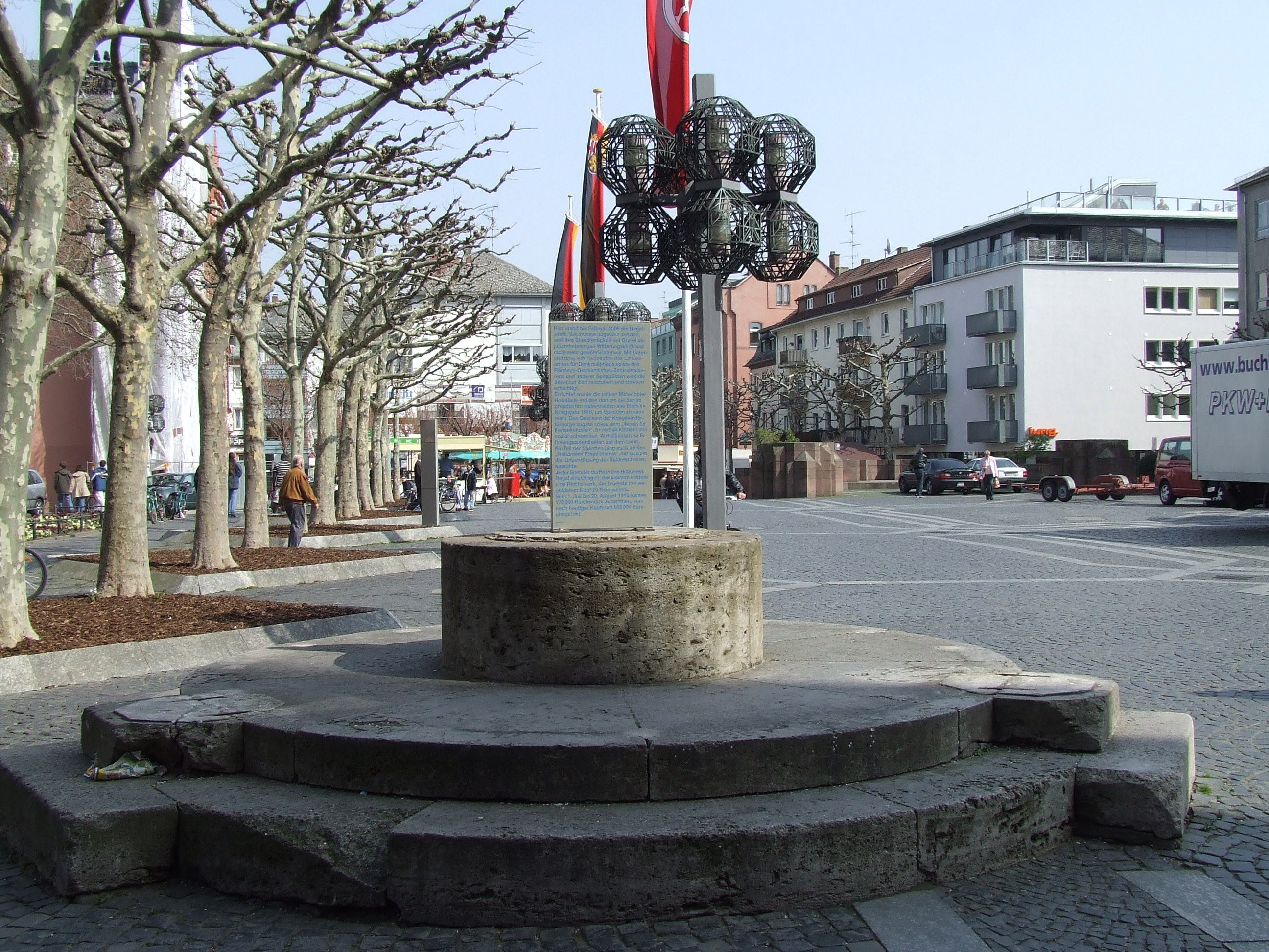 Nagelsäule (Mainz) in Mainz